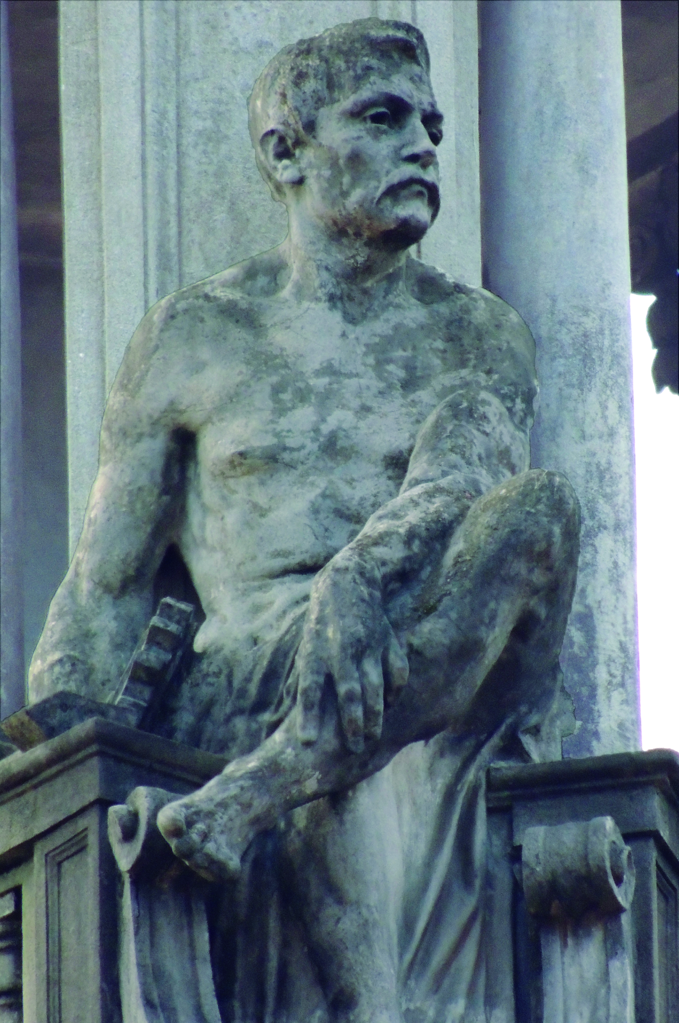 Integra um conjunto de estátuas na torre da Bolsa de Café na cidade de Santos. As estátuas têm cerca de 4,5 m de altura e são feitas em cimento. Moldadas por Van Emelen em seu ateliê no Palácio das Indústrias, São Paulo, em 1922, as estátuas teriam sido inauguradas só em 1923 depois da inauguração da Bolsa, pois a torre ainda estava em construção.